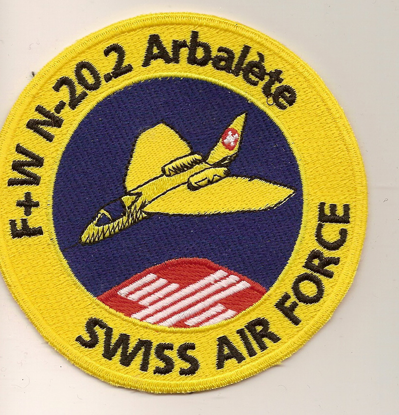 Badge der Arbalete